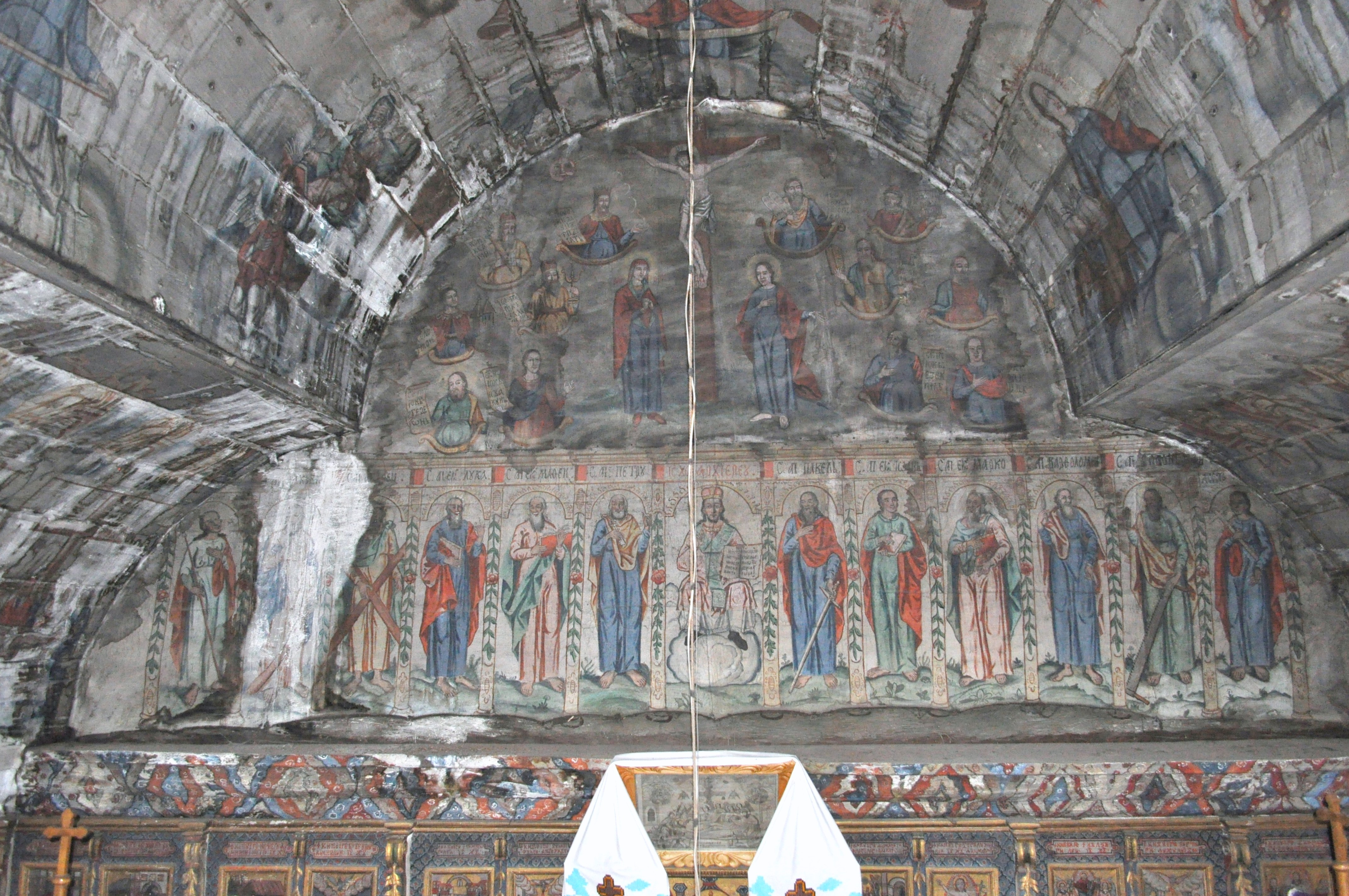 Biserica de lemn "Sfinții Arhangheli Mihail şi Gavril", sat PLOPIŞ; comuna ŞIŞEŞTI